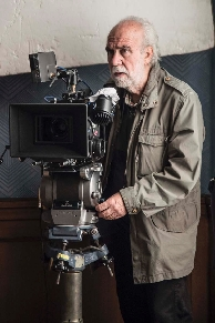 Lab CSC